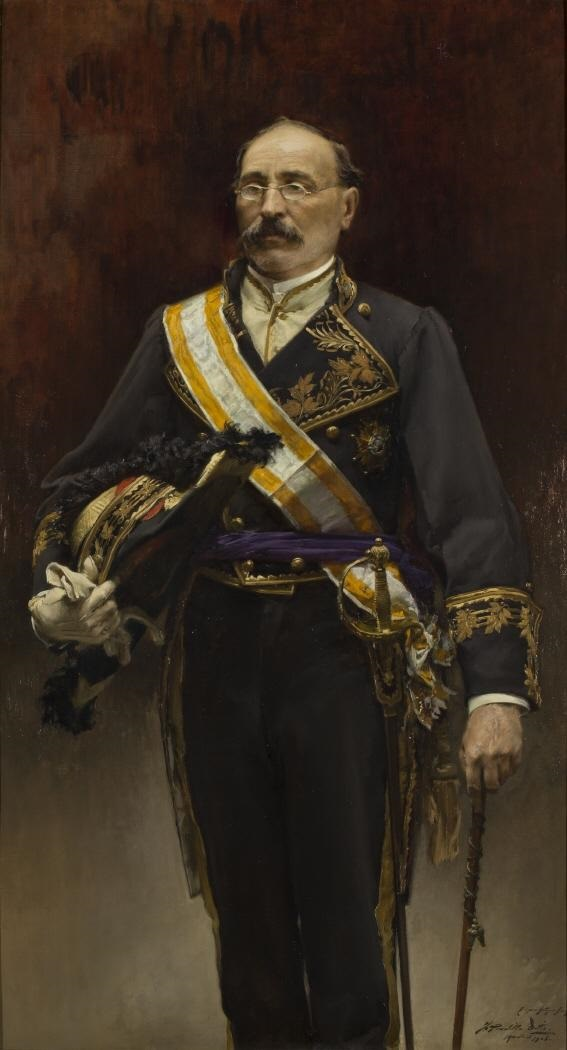 Retrato del ingeniero español Mariano Royo Urieta (1825-1900).